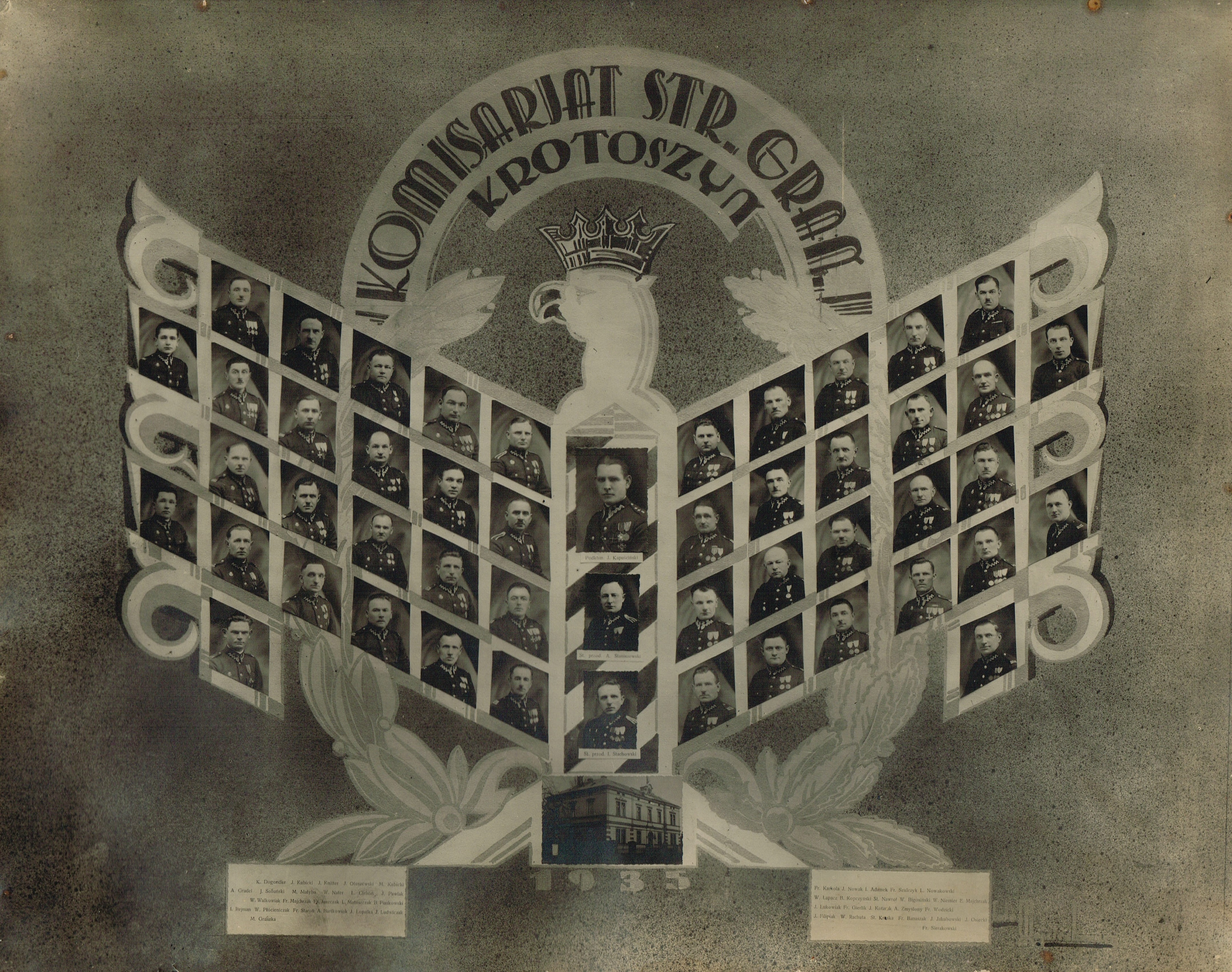 Ze zbiorów Muzeum Regionalnego w Krotoszynie.